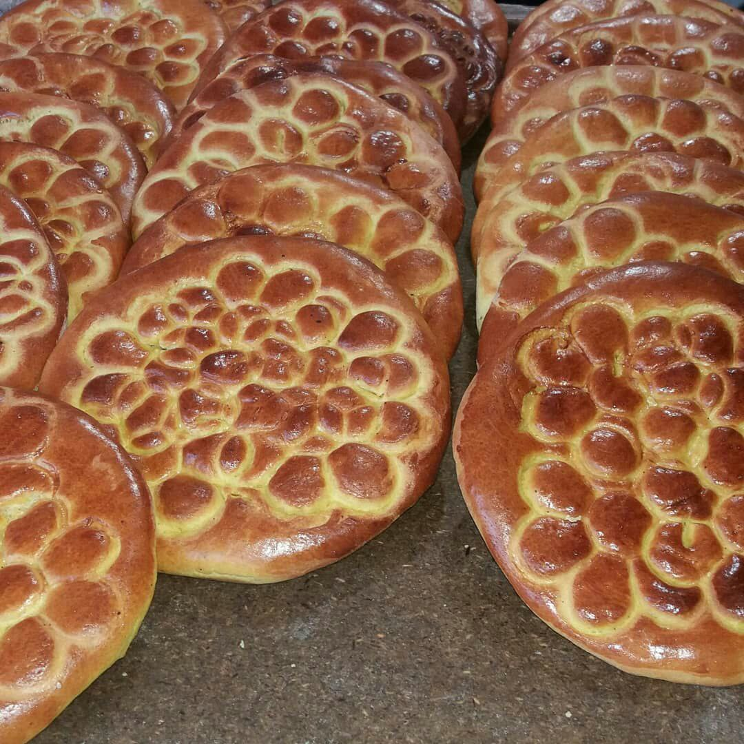 فطیر خوشمزه مهربان